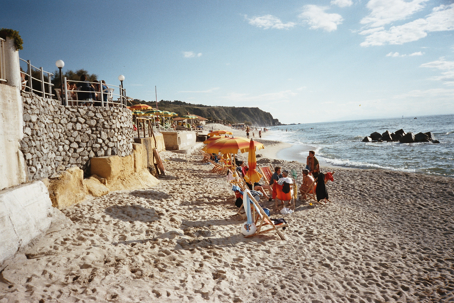 Ricadi, Calabria, Spiaggia